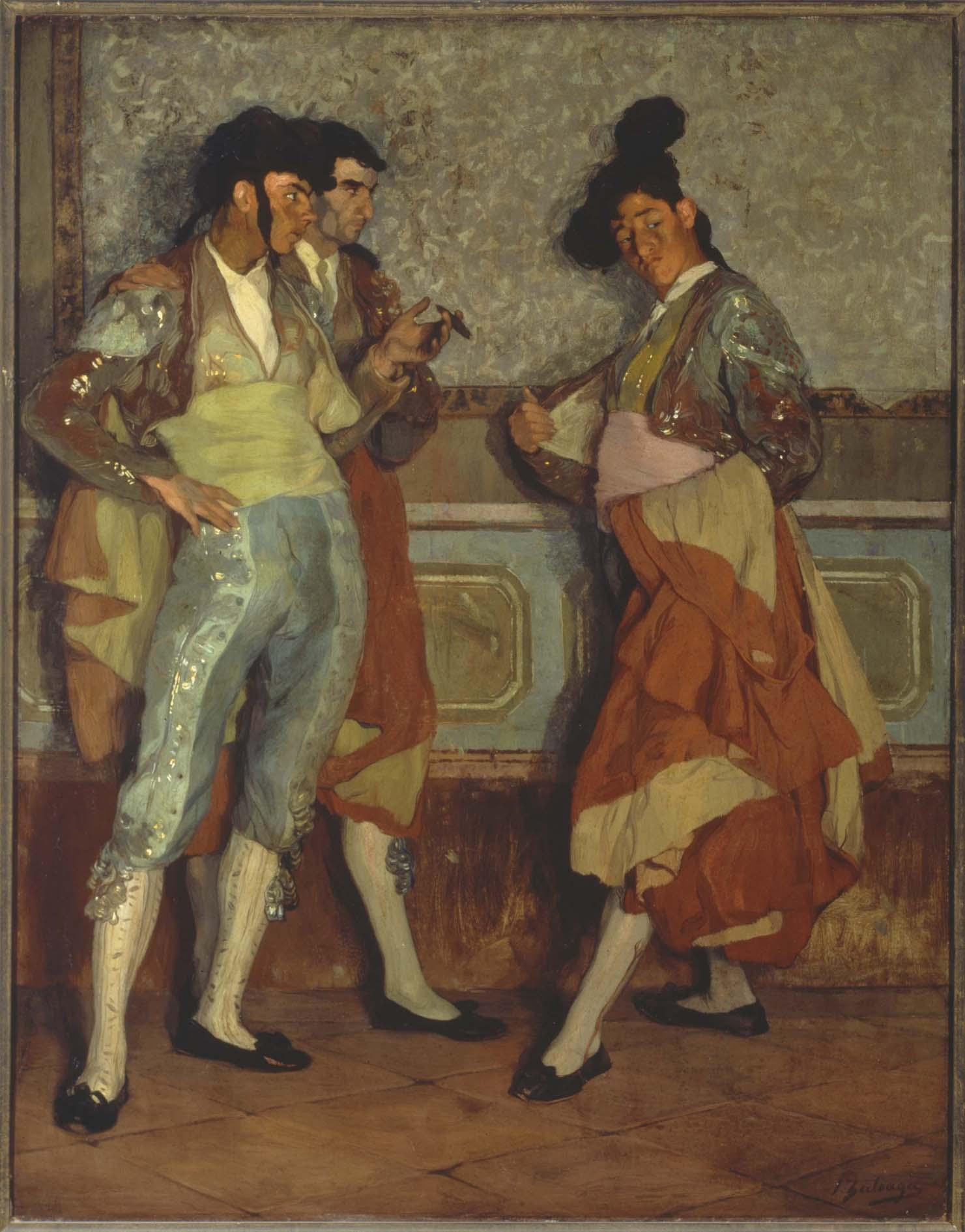 Torerillos de pueblo (1906). Ignacio Zuloaga. Museo Nacional Centro de Arte Reina Sofía. Madrid, España